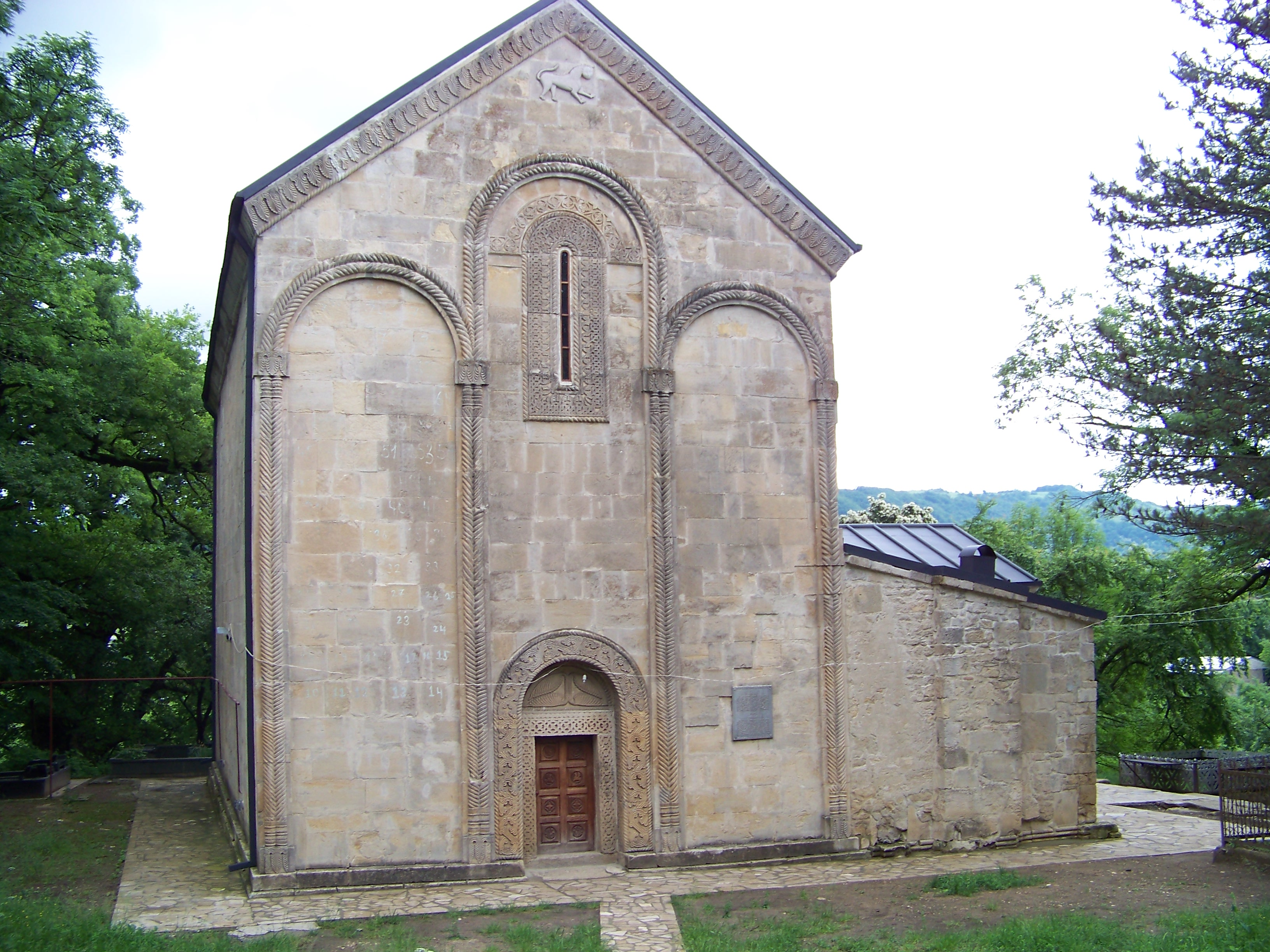 სავანის წმინდა გიორგის ეკლესია, სამრეკლო და სხვა ნაგებობანი